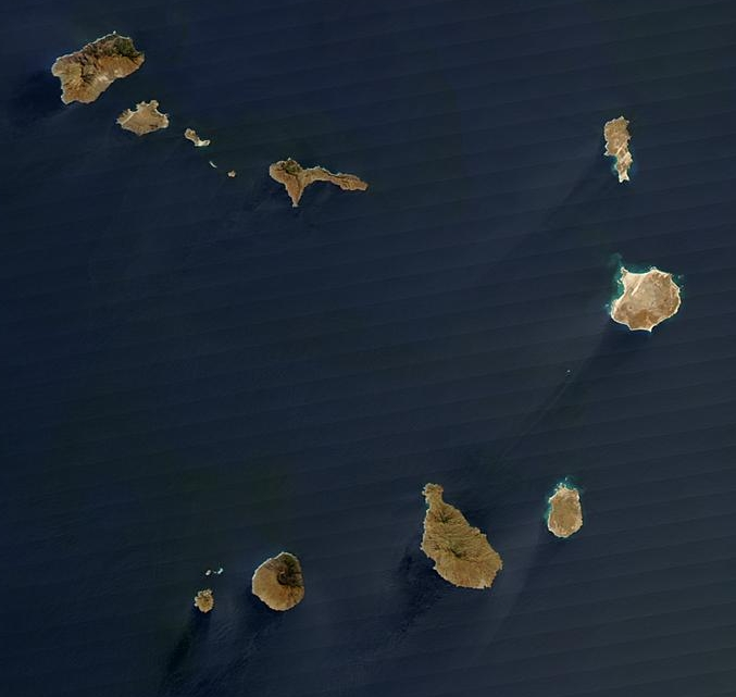 Satellitenfoto der Kapverdischen Inseln